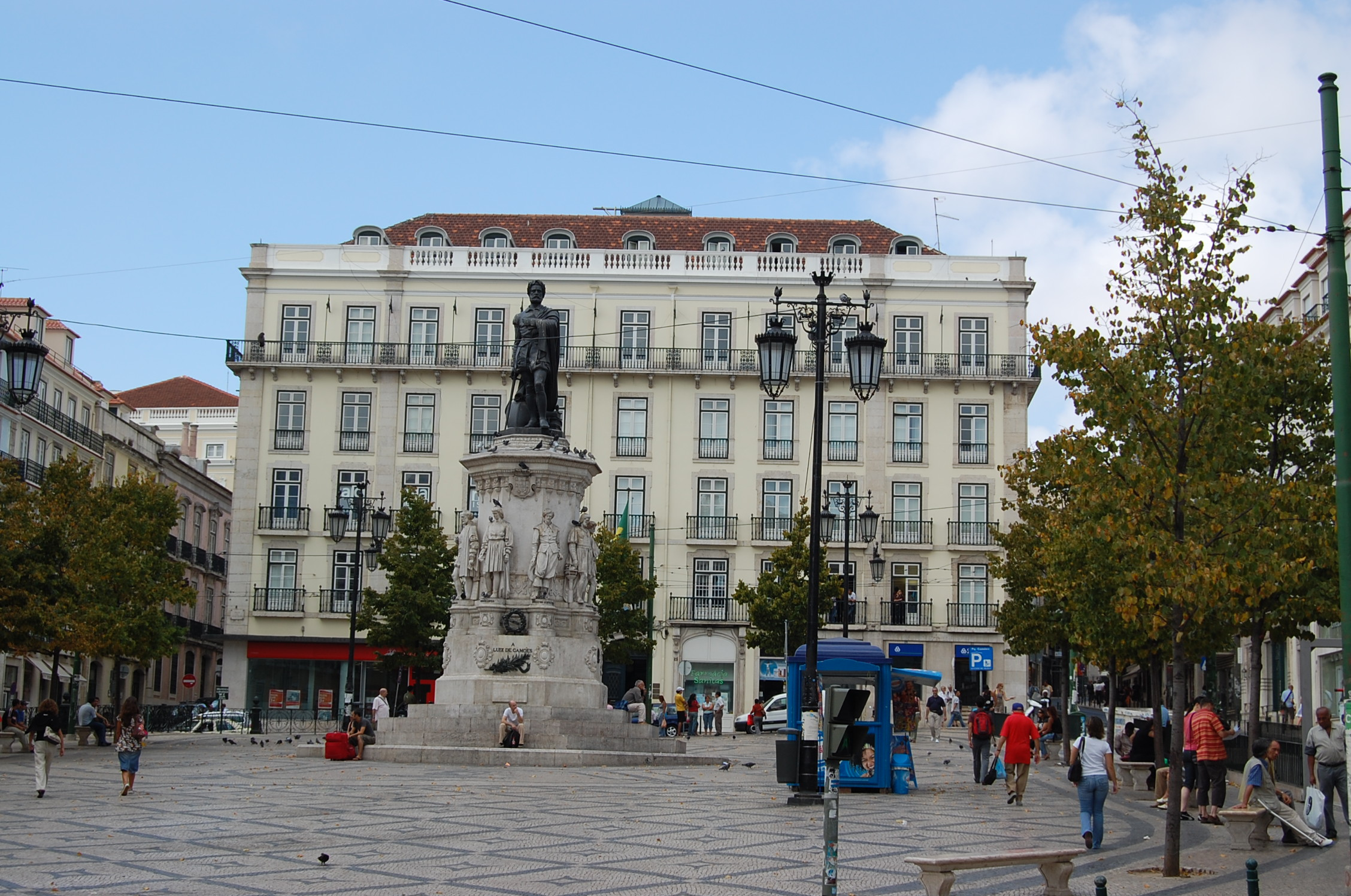 Praça Luís de Camões, Lisboa Portugal.